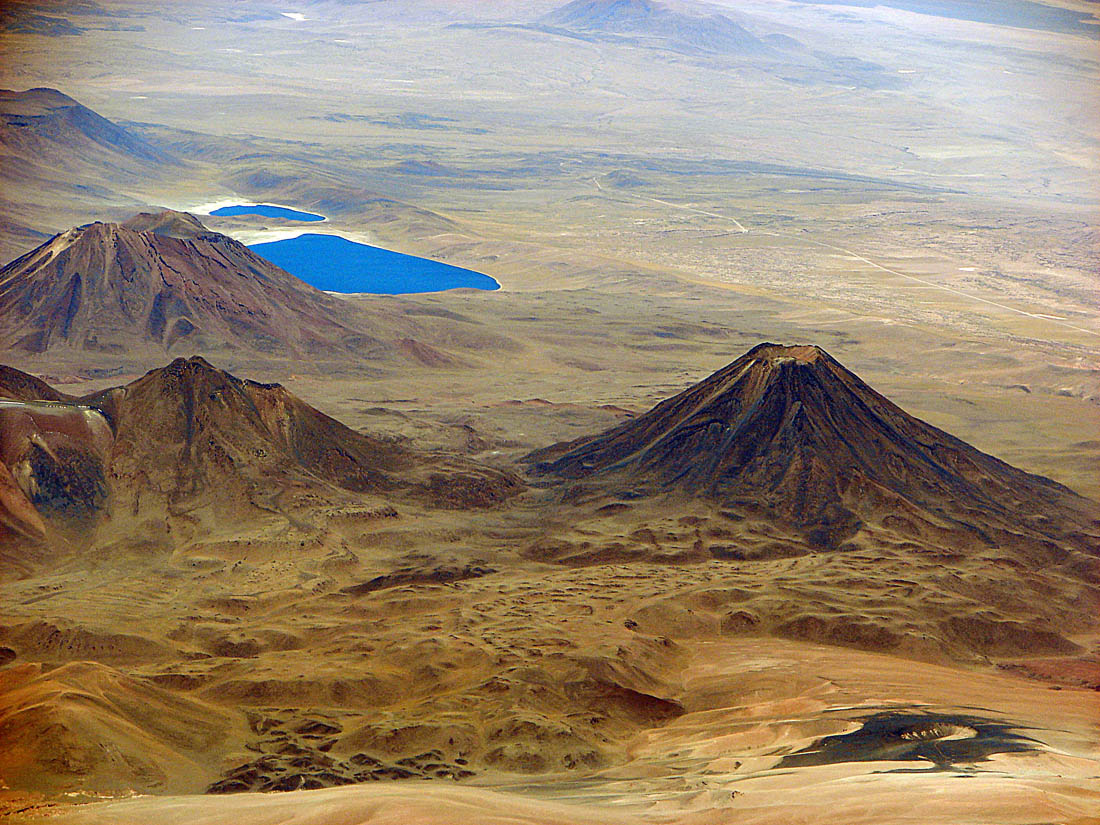 Paisaje al este del Salar de Atacama en Chile. Volcán Chiliques (centro derecho), Volcán Miscanti (izqierdo, al lado de la Laguna Miscanti), Maar del Volcán Overo (derecho, abajo).